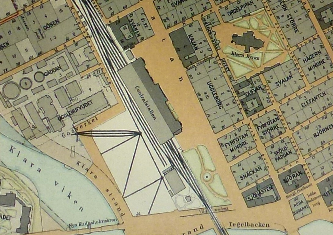 Stockholms centralstation på en karta från 1899